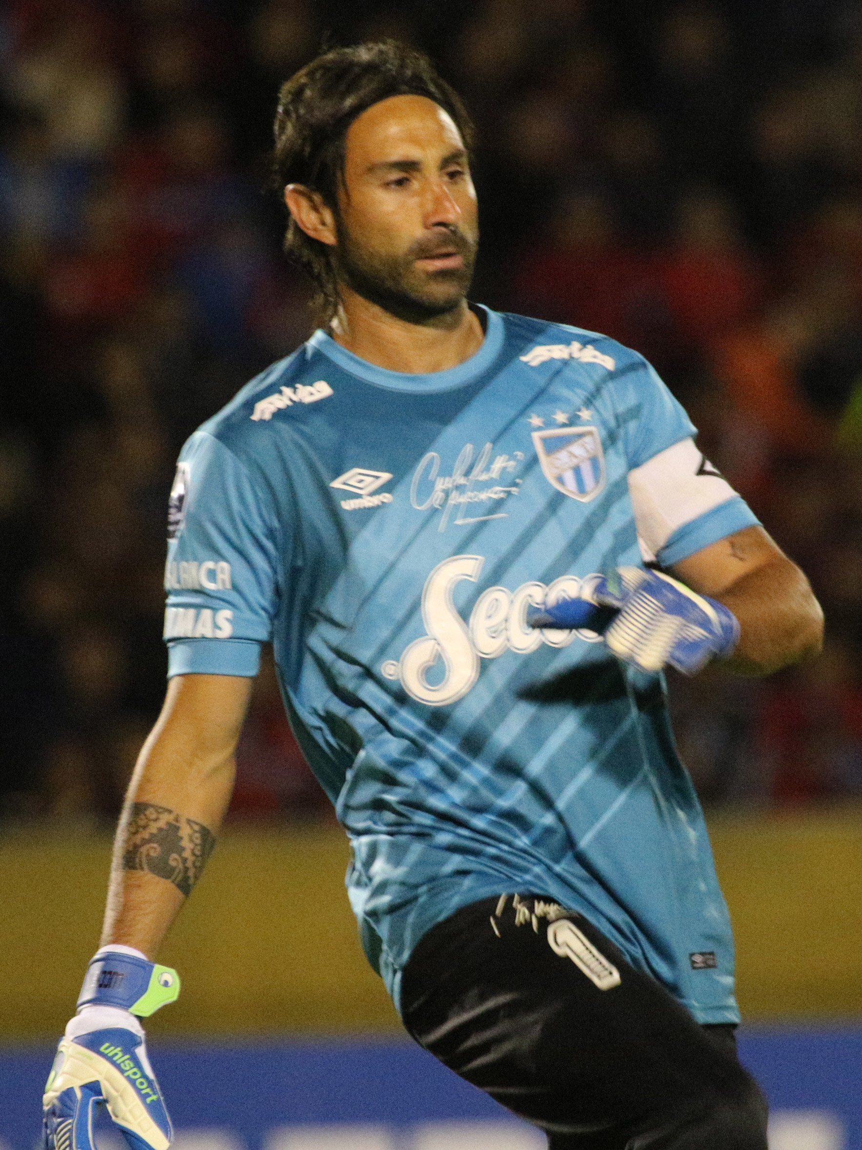 Quito, 7 Feb (Andes).- Encuentro por copa libertadores entre Nacional de Ecuador vs Atlético Tucumán de Argentina. Fotografías: Carlos Rodríguez/Andes.